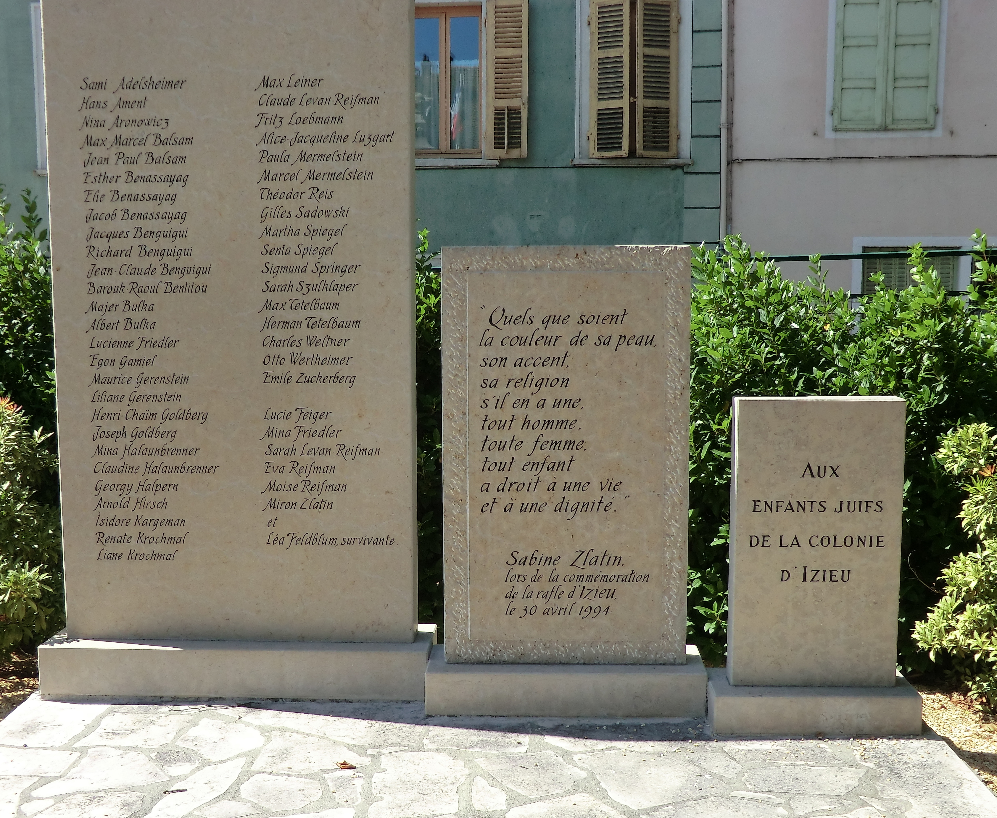 Mémorial des Enfants d'Izieu à Belley.